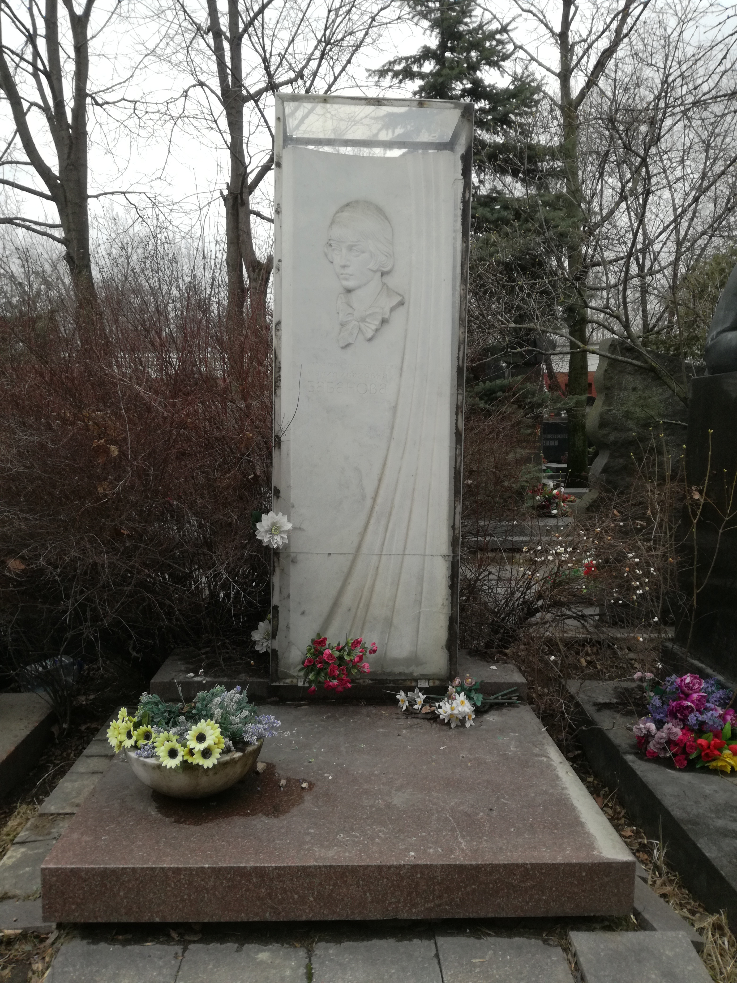 Новодевичье кладбище